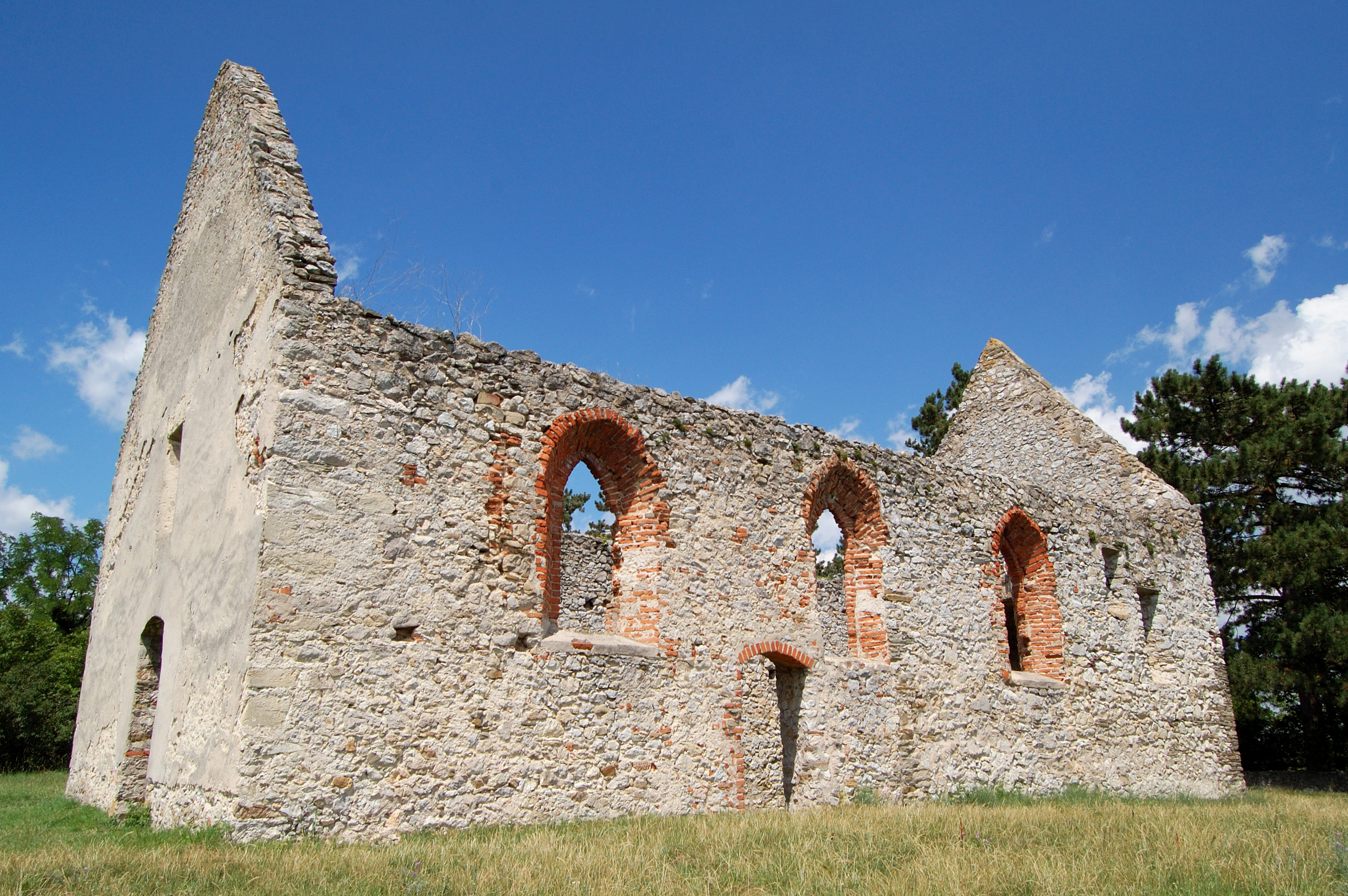 ruina kostolíka v Haluziciach